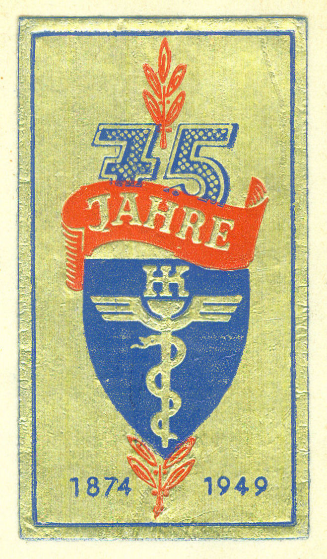 Briefkopf von 1949